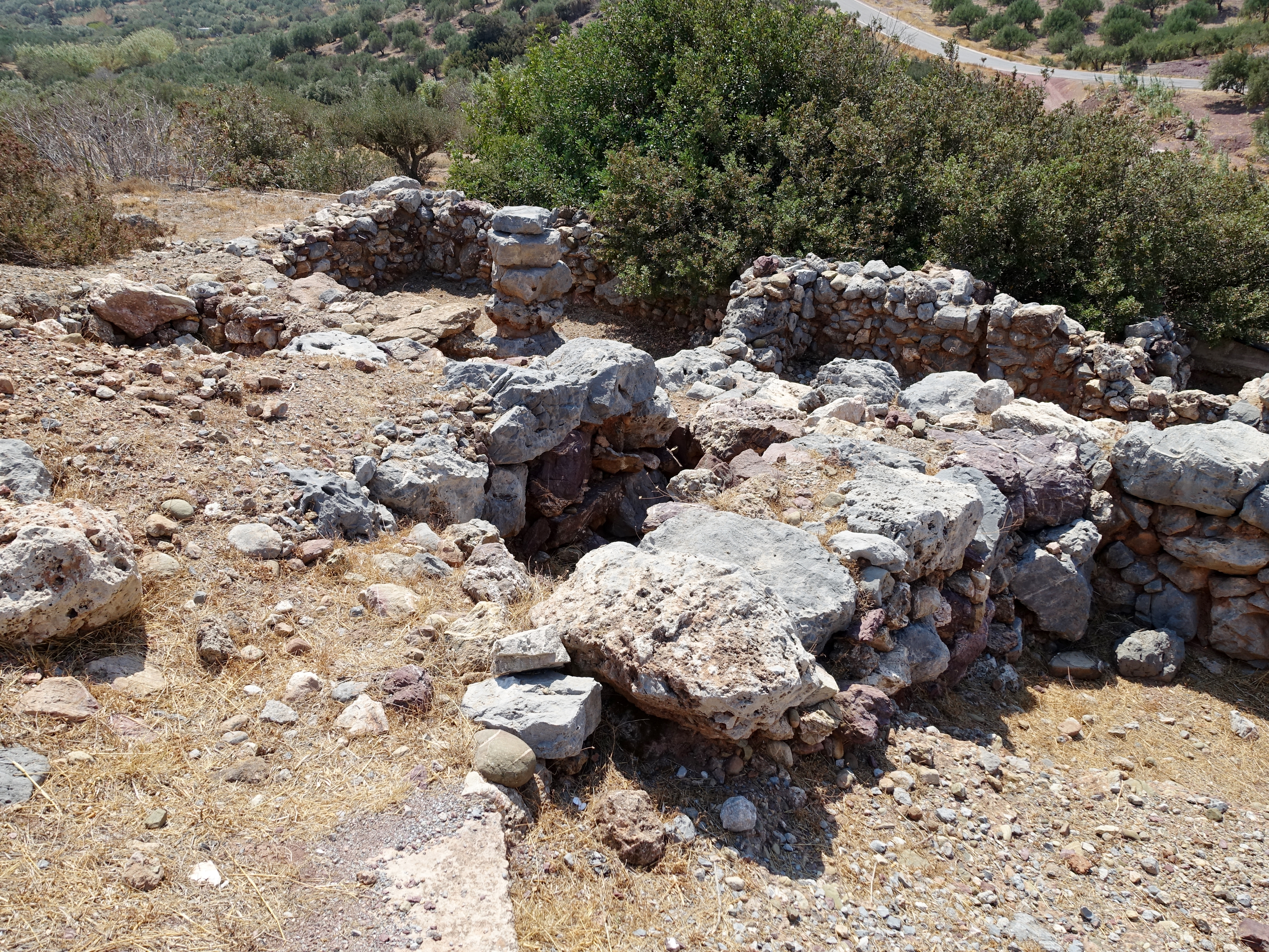 Ausgrabungsstätte der minoischen Villa bei Epano Zakros, Kreta, Griechenland